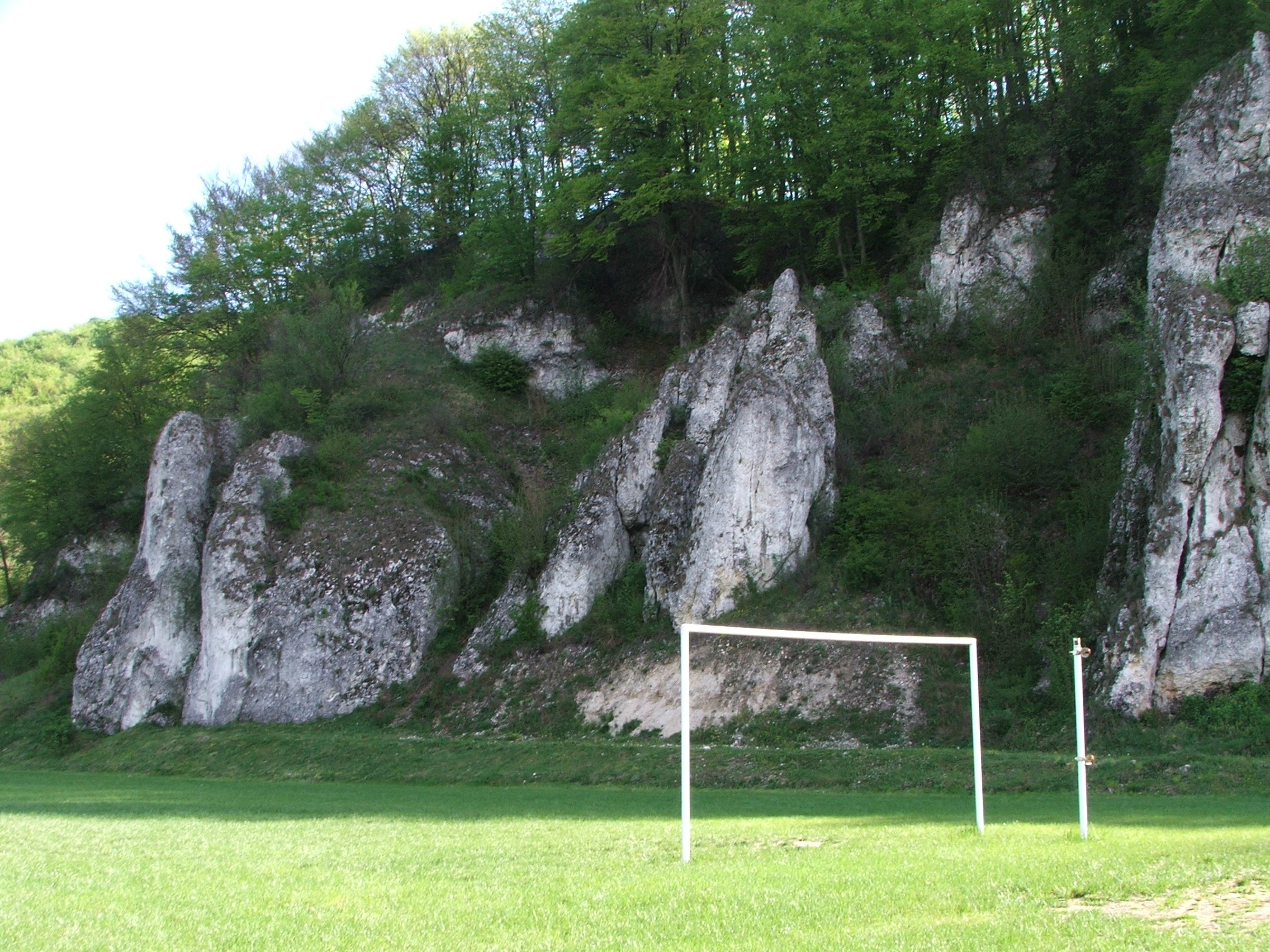 Dolina Racławki (Dolinki Krakowskie)